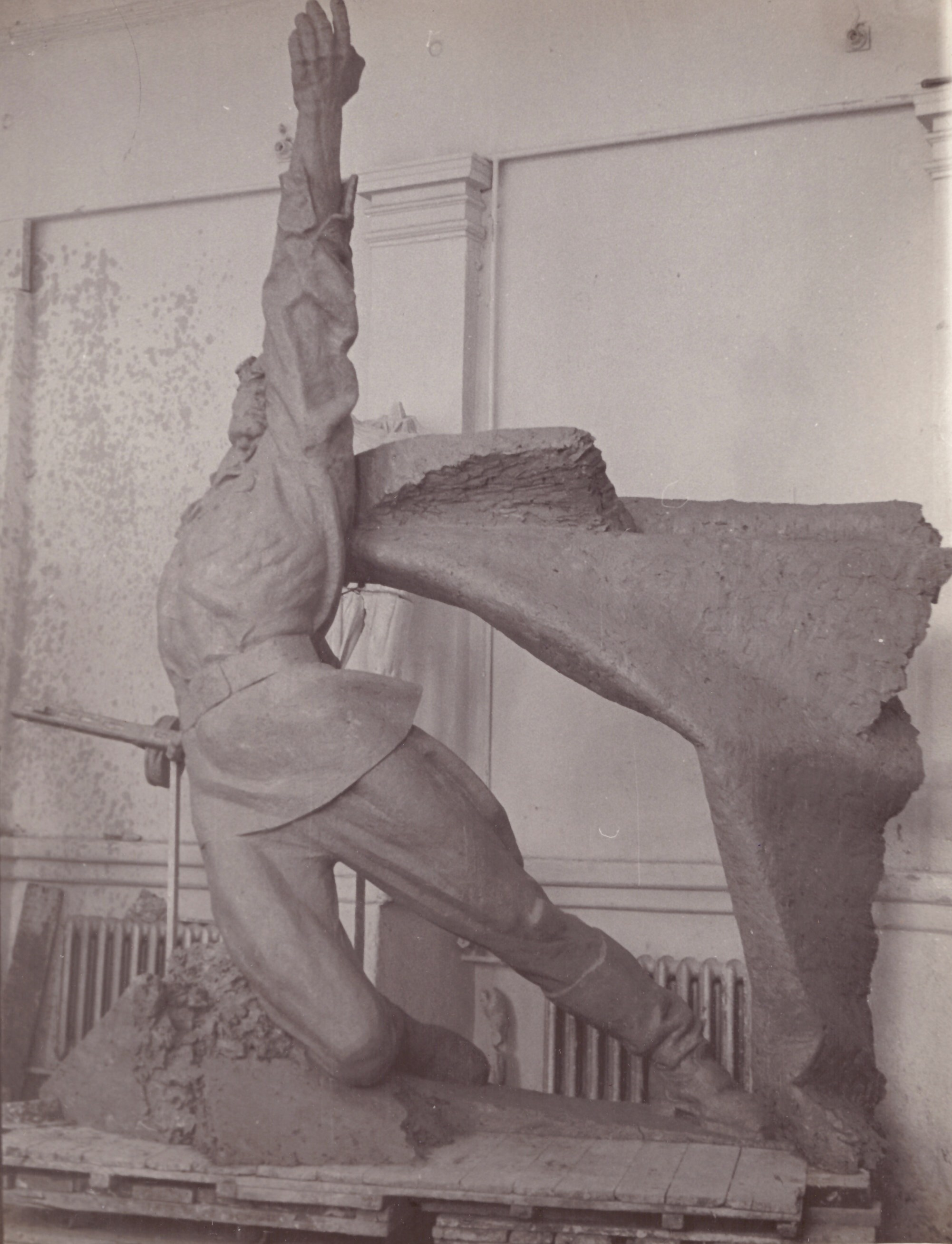 Пам’ятник загиблим воїнам-односельчанам в роки Великої Вітчизняної війни 1941-1945 р.р. С. Звіздаль Народицький район Житомирська область. 1973. Скульптор Таранченко В.О. Литий бетон.